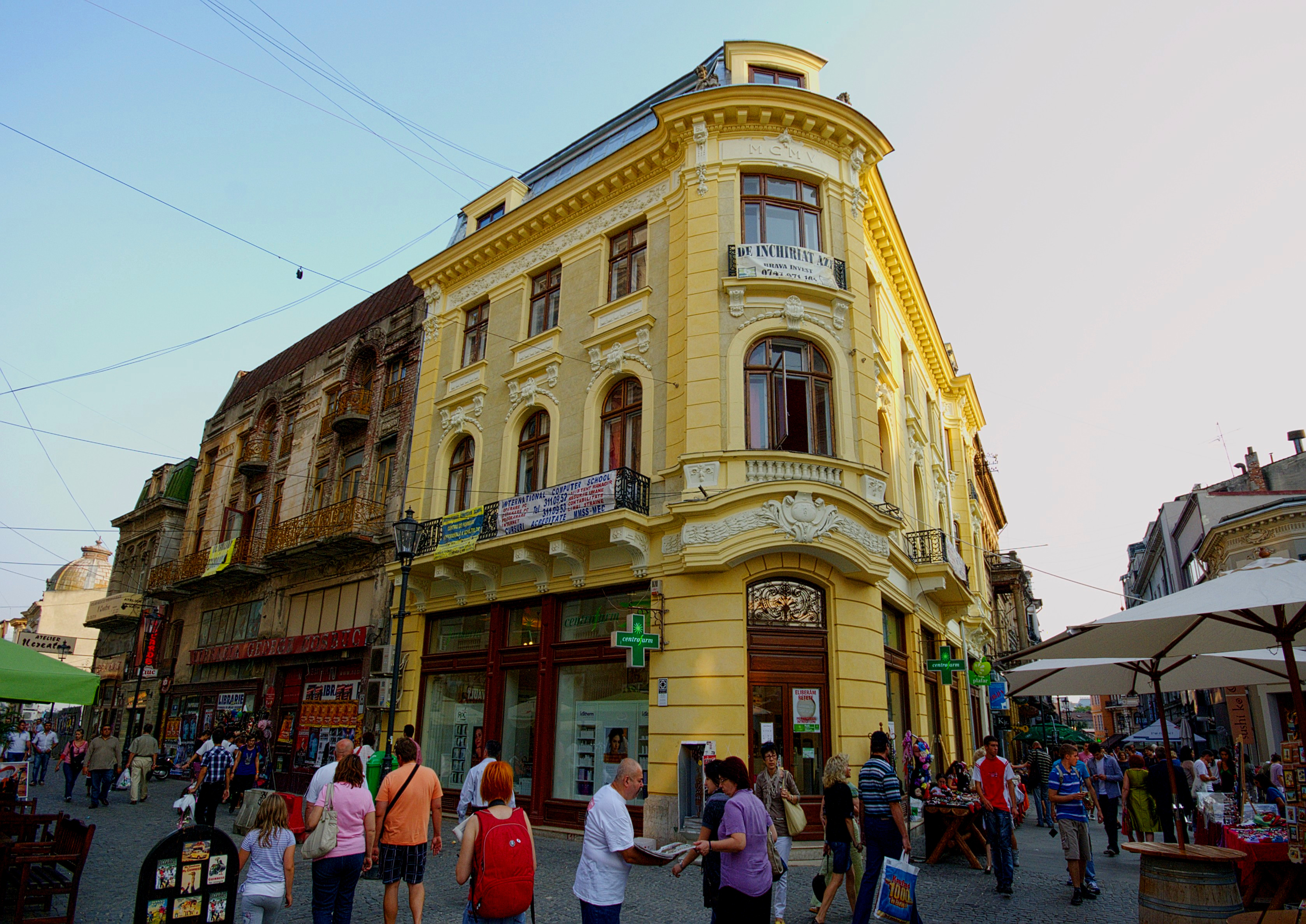 Casă cu prăvălie, Lipscani 24